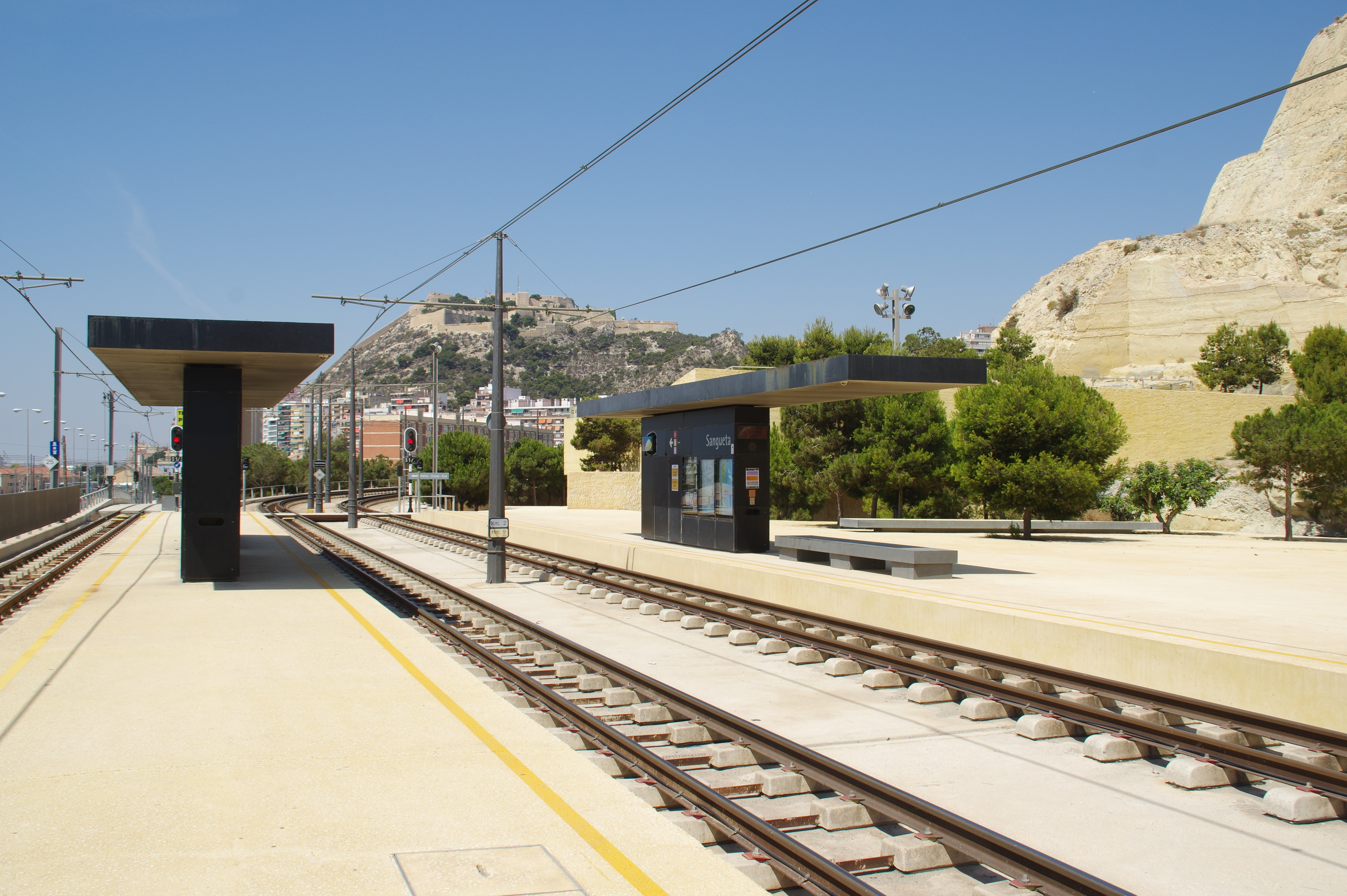 ®s K3 SD Ð ┼ ALICANTE TRAM APEADERO de SANGUETA